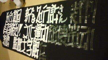 スポンジを使用しているため線が一定であり、後からなぞり塗りつぶしていることがわかる。